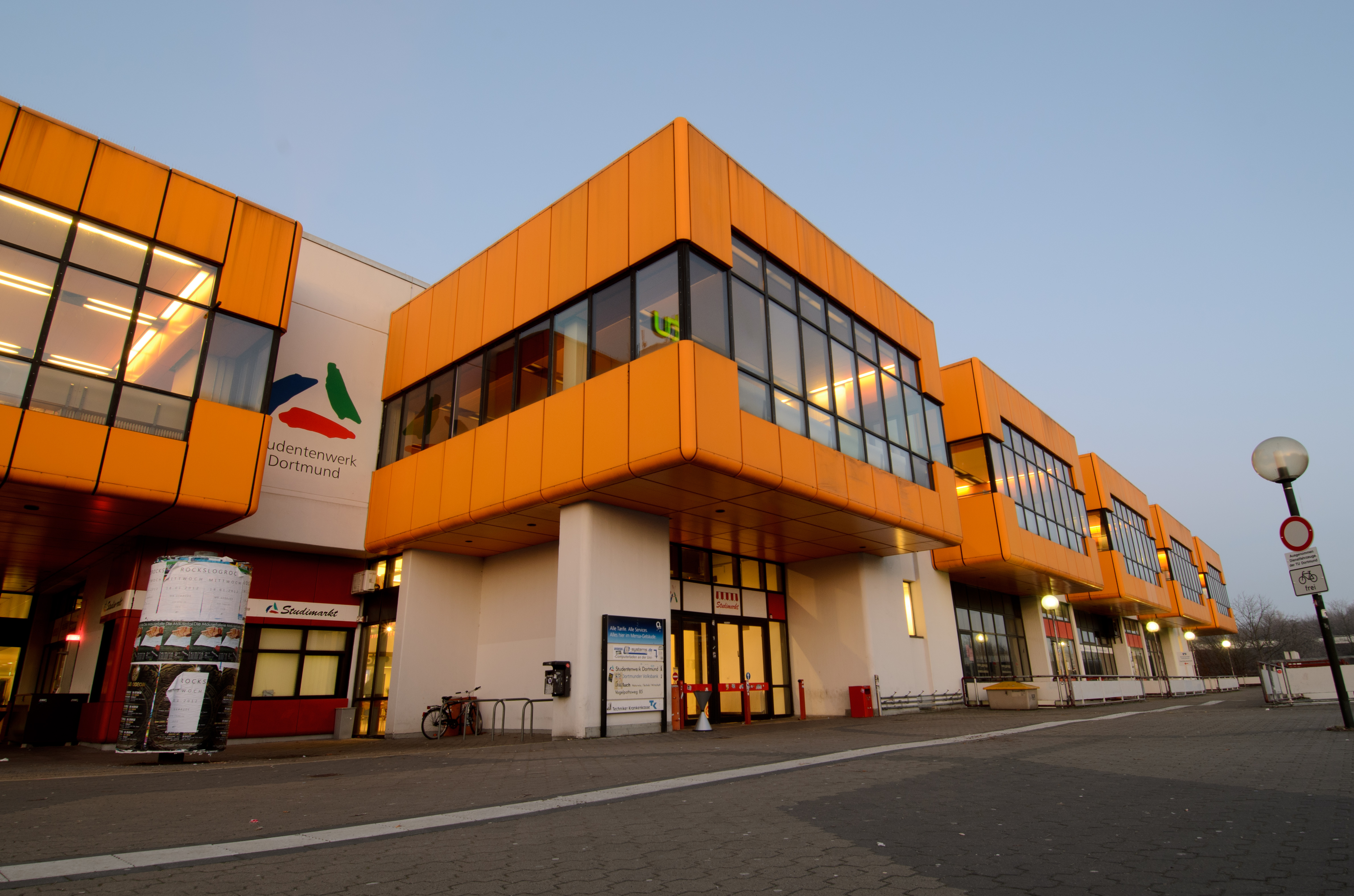 Mensa Gebäude TU Dortmund